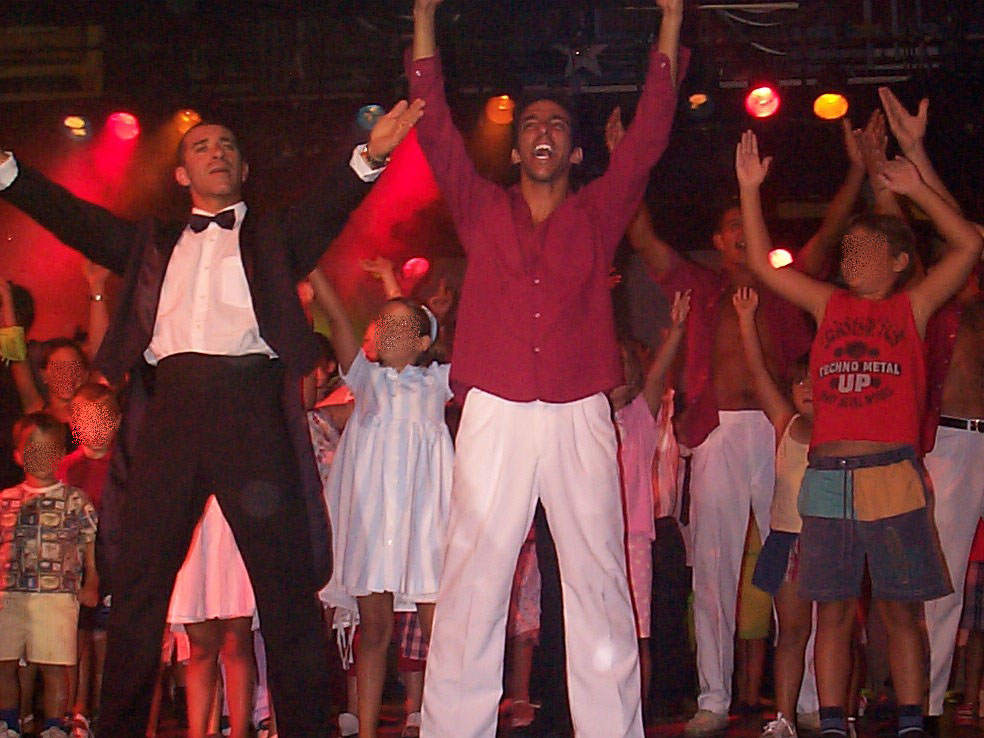 David Strajmayster (Doudi), Gentil organisateur (GO) au Club Med de Marbella en aout 1999. Marbella, Spain.